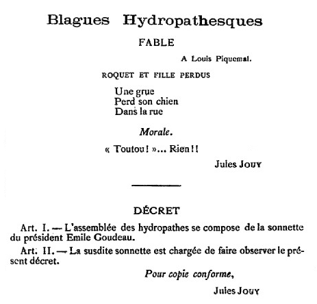 Section des Blagues Hydropathes du journal L'Hydropathe du 5 février 1879, page 4. Auteur : Jules Jouy.